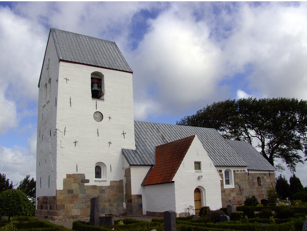 fra sydvest